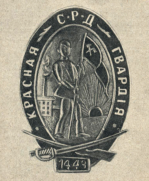 Фото значка красногвардейца из книги: История Гражданской войны в СССР. Подготовка Великой Пролетарской революции (От начала войны до начала октября 1917 г.) / Под ред. М. Горького, В. Молотова, К. Ворошилова, С. Кирова и др. — М. : ОГИЗ. Гос. изд-во «История Гражданской войны», 1935. — С. 256.